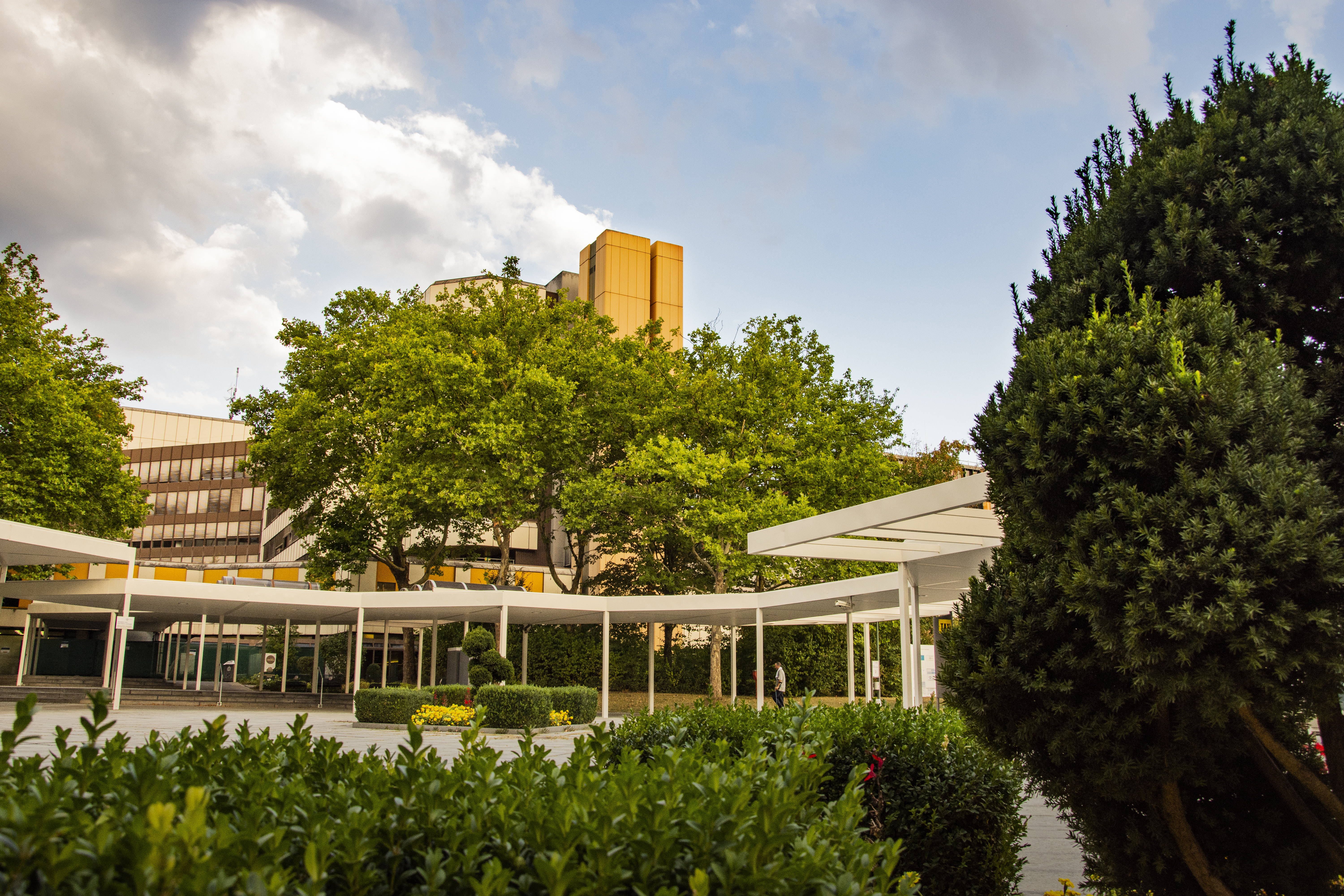 Der Haupteingang des Klinikums Ingolstadt